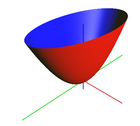 Eliptický paraboloid.